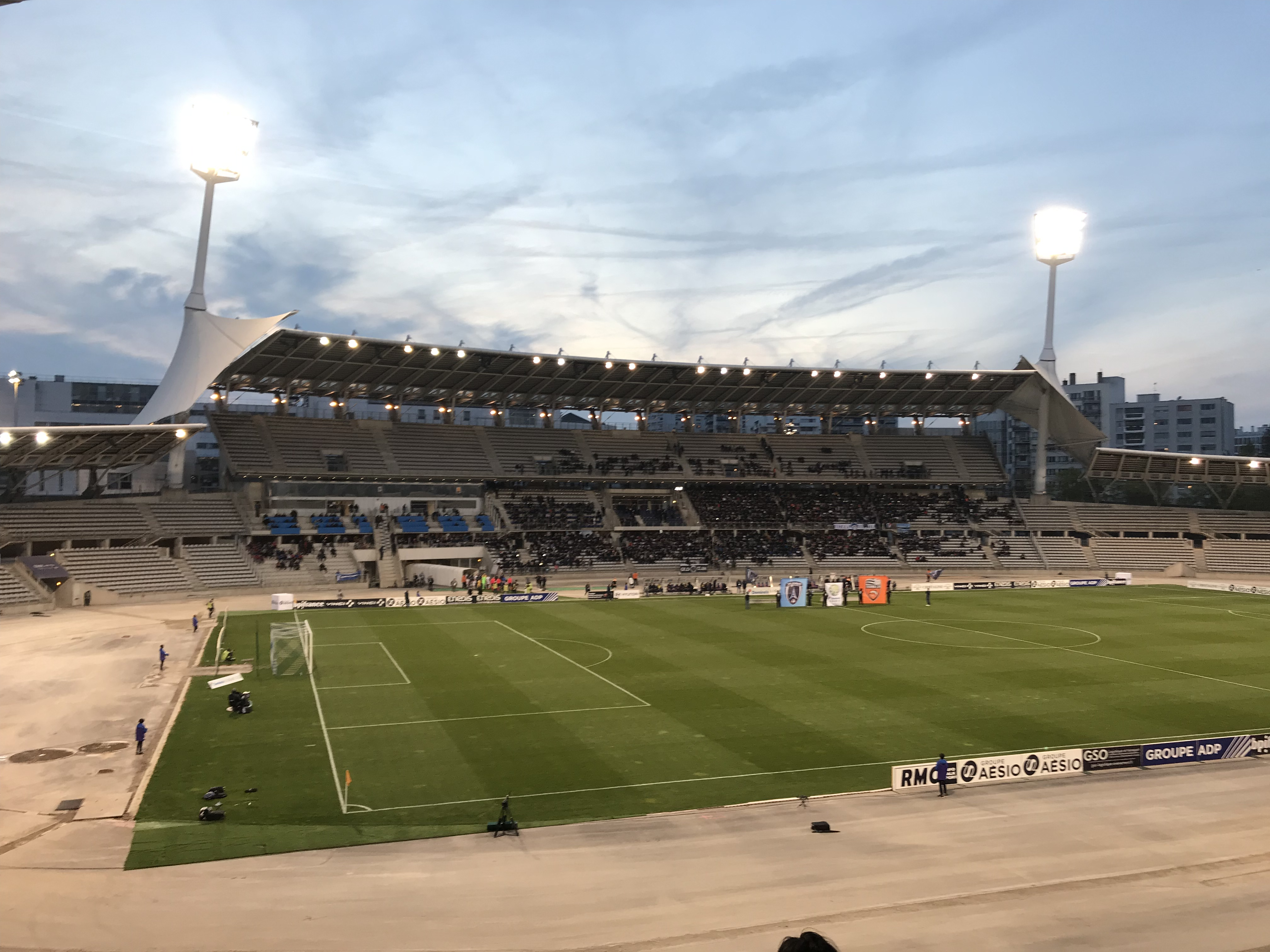 Stade charlety